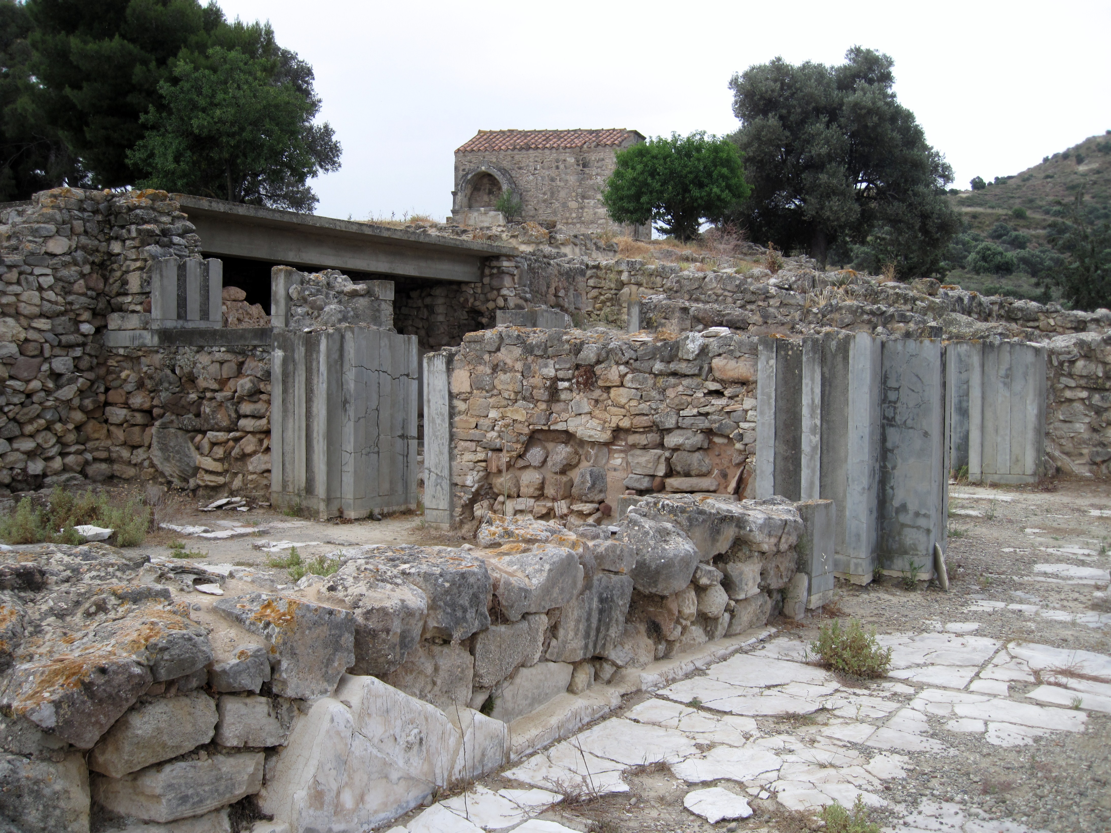 Ausgrabungsstätte von Agia Triada in der Gemeinde Festos, Regionalbezirk Iraklio, Kreta, Griechenland